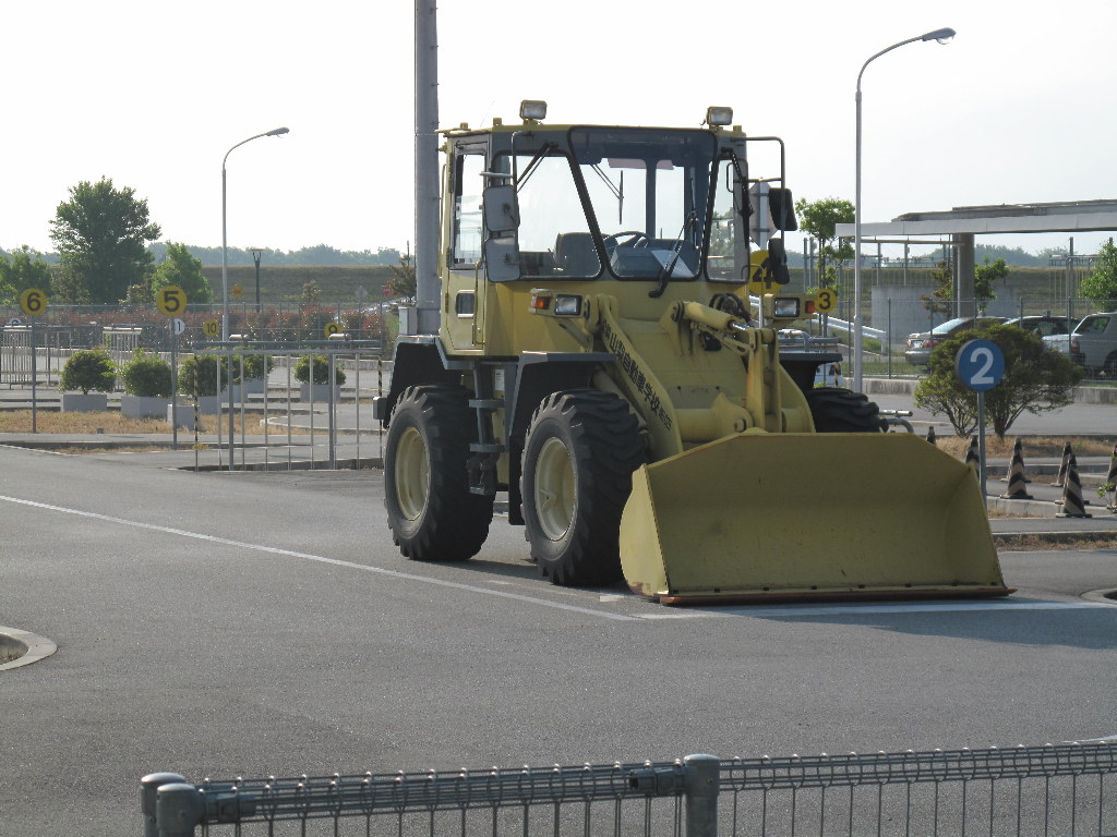 大型特殊自動車用教習車 小松製作所 WA100